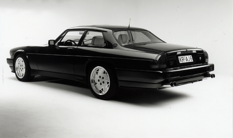 1988 entstand mit einer völlig neuen Dachkonstruktion der AJ6 auf Basis des Jaguar XJS 1988 Arden Werksfoto Fotograf Heinz Holzbach